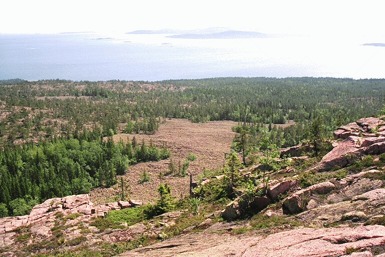 Photo by: Curt Fredén, SGU Från Slåttdalsberget ser man mot väster högsta kustlinjen på Skulebergets östsluttning och mot öster den största klapperavlagringen inom Höga Kusten (fig.6.A). Avlagringen sträcker sig från nivån ca 180 m ö.h. vid Tärnättvattnen i norr till ca 95 m ö.h. i sydöst. På avlagringen förekommer 1–2 m höga strandvallar. Helt dominerande bergart är Nordingrågranit. Närmast Slåttdalsberget är klappern relativt grov och på ytan finns flera stora talusblock som fallit ned från den sprickrika bergsidan. Längre ned på sluttningen avtar grovleken på klappern och rundningsgraden ökar. På strandvallarnas krön dominerar småsten och grus medan blocken ligger i svackorna mellan vallarna. I och omkring klapperavlagringen finns bestånd av relativt tät blandskog beroende på ytligt förekommande grundvatten